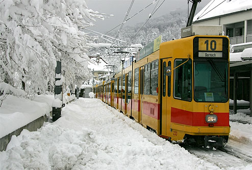 Arlesheim: Kein Tram fährt mehr der Schneeverhältnisse wegen.